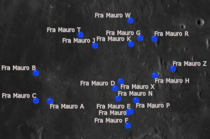 Cráter lunar Fra Mauro. Cráteres satélite. (Imagen LROC)